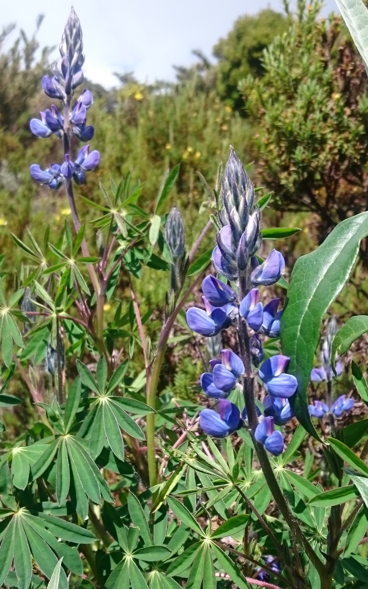 Inflorescencia de Lupinus costaricensis